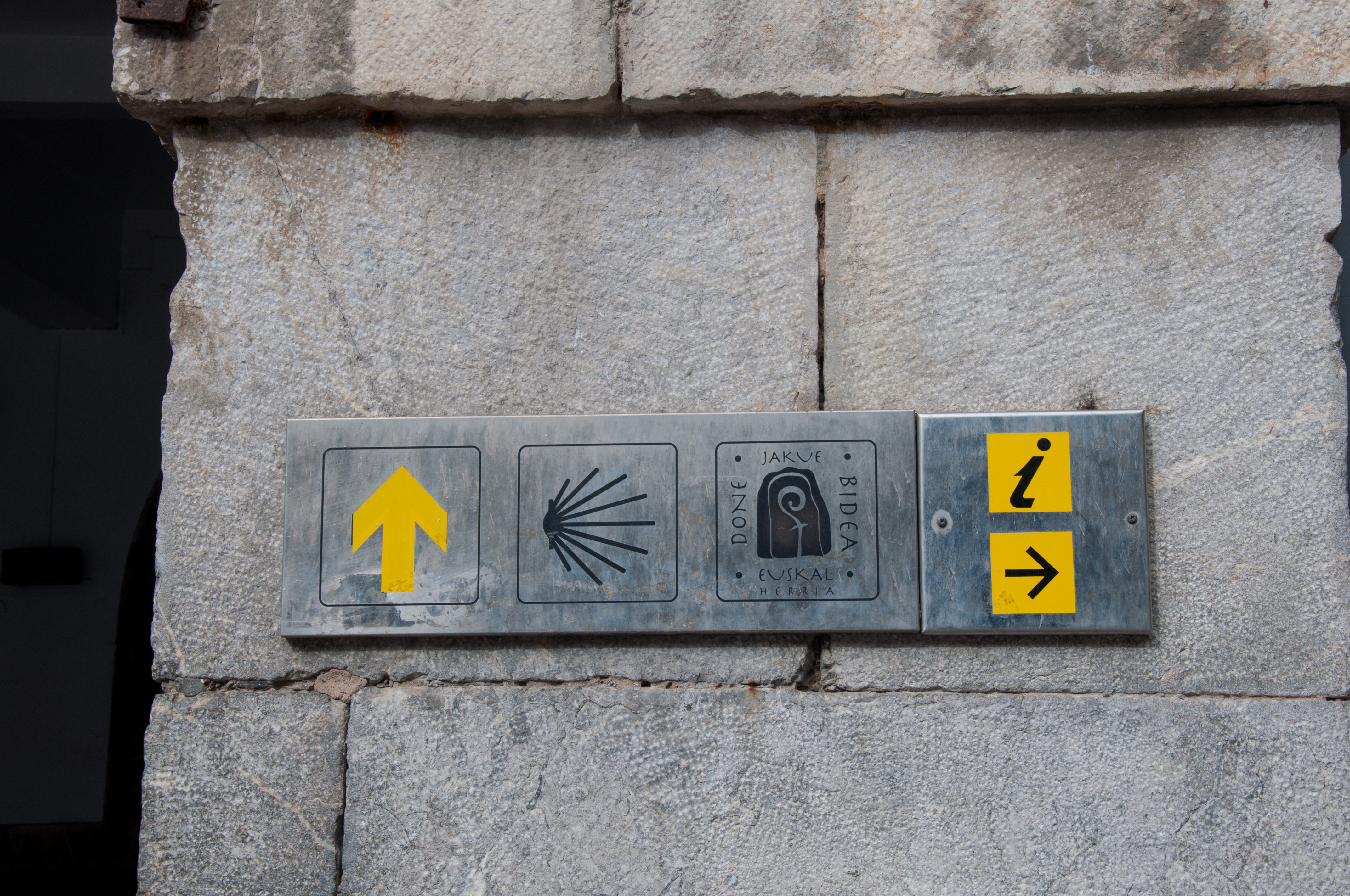 Euskal Herriko Donejakue bidean zehar aurki daitezkeen seinaleetako bat.